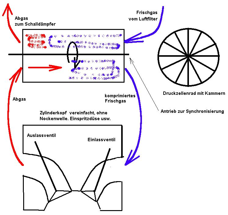 Prinzipskizze des Comprex-Lader-Verfahrens.